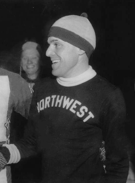 1938 Press Photo Dick Werner & Eddie Schroeder at Middle Atlantic Skating